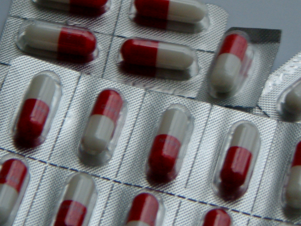 paracétamol